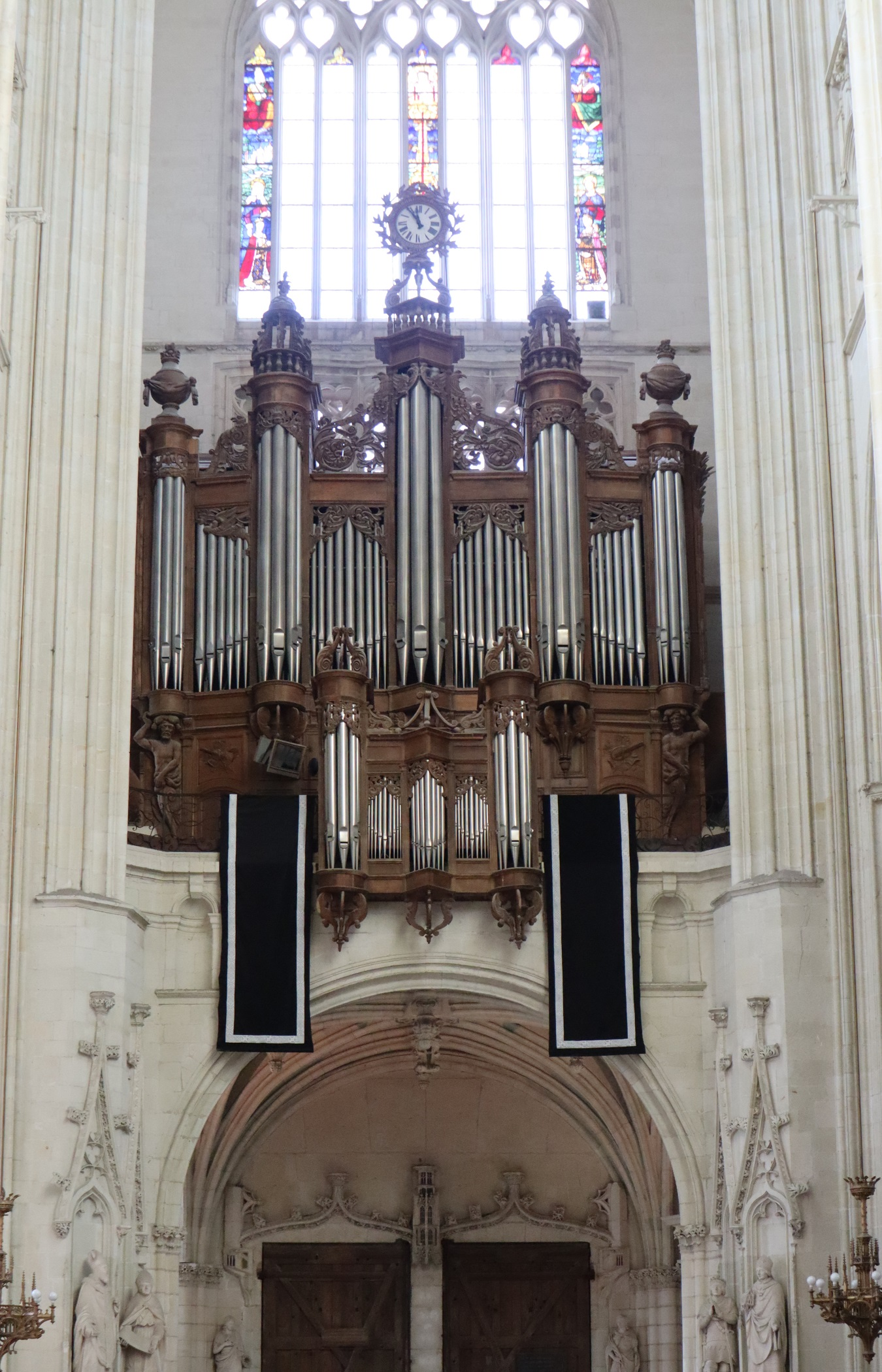 Les Grandes-Orgues de la cathédrale Saint-Pierre-et-Saint-Paul de Nantes (44) drapées de noir après le décès de Félix Moreau, organiste titulaire honoraire.